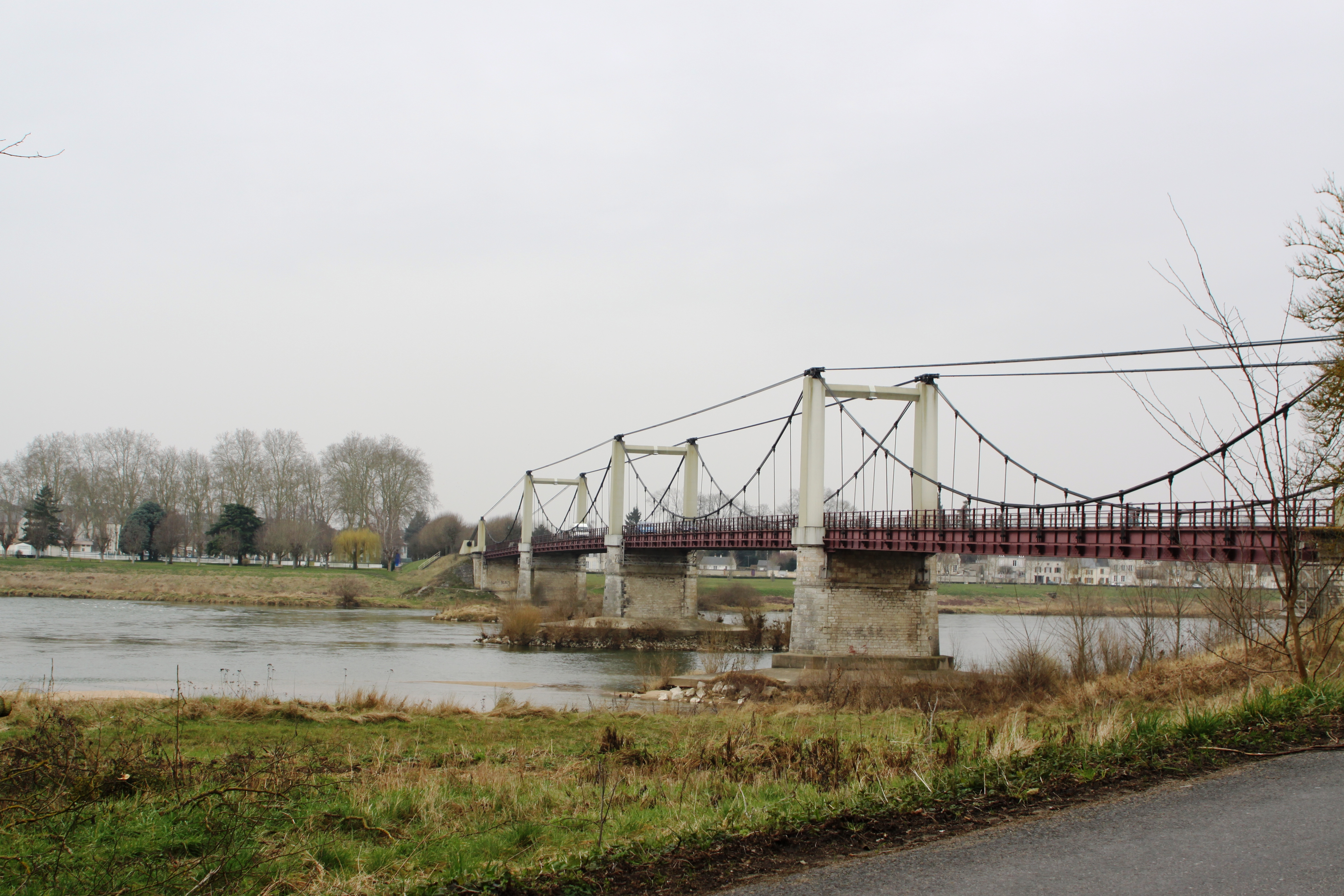 D'Bréck zu Meung-sur-Loire vum lénksen Uwänner gesinn.